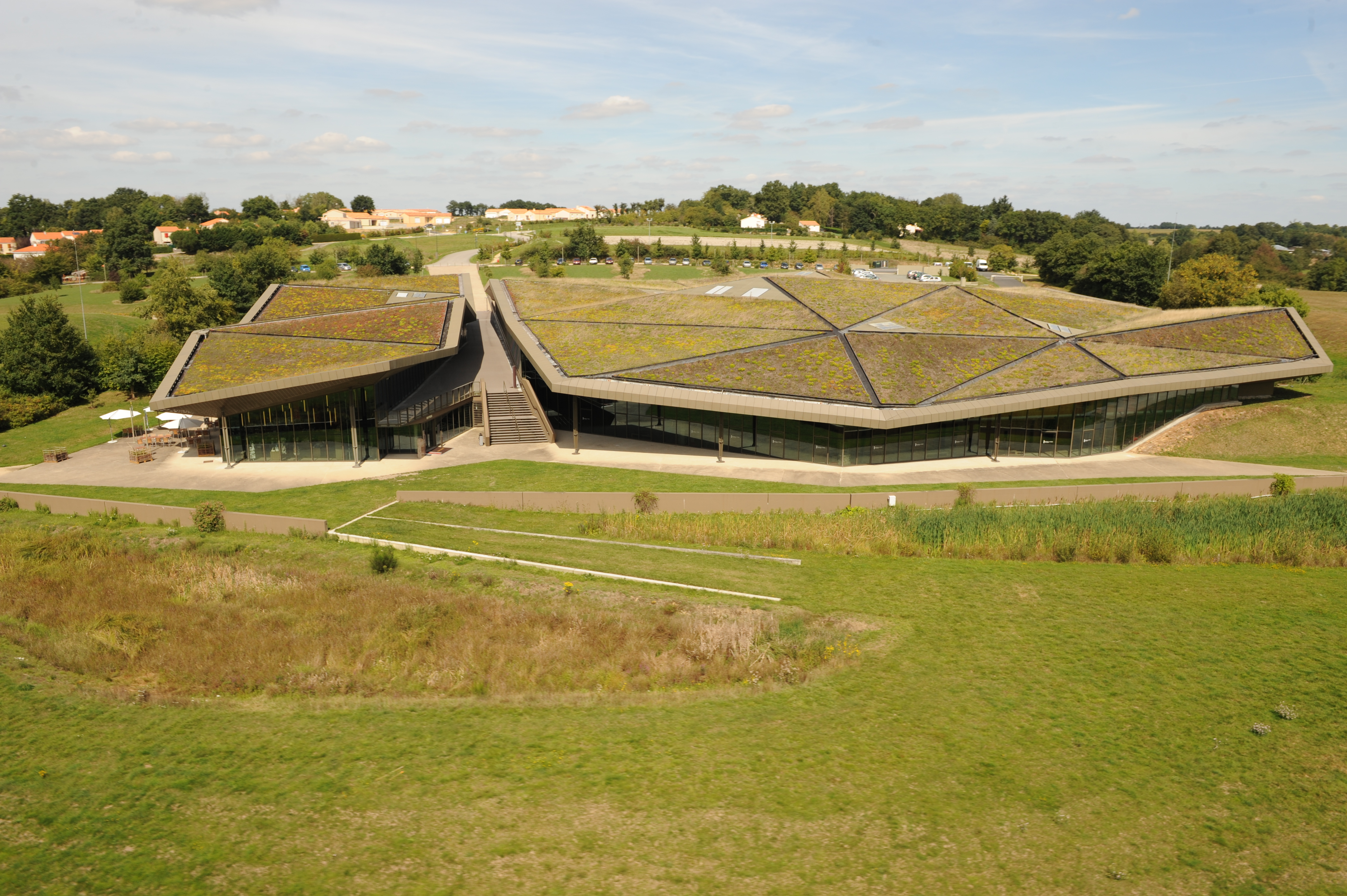 Vue aérienne